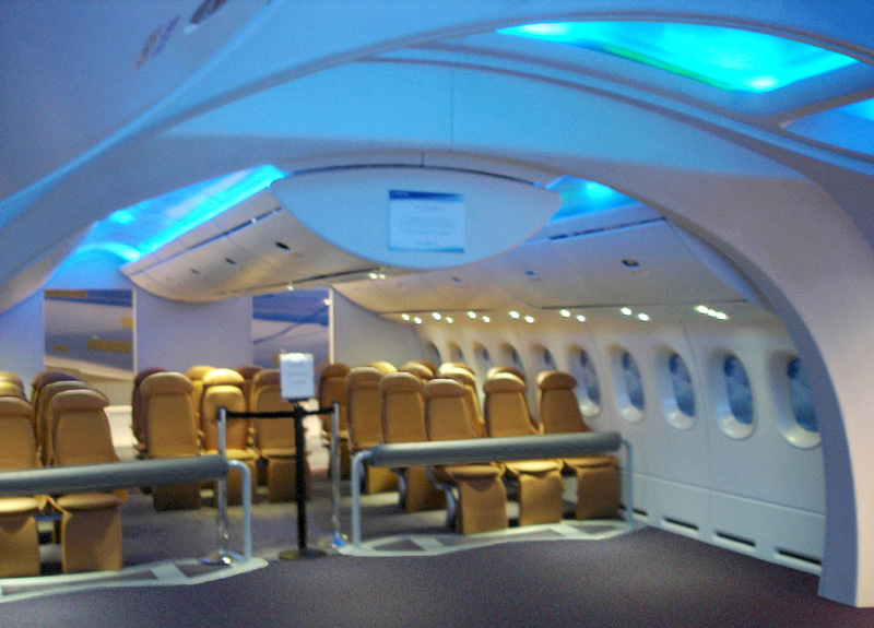 787 mockup